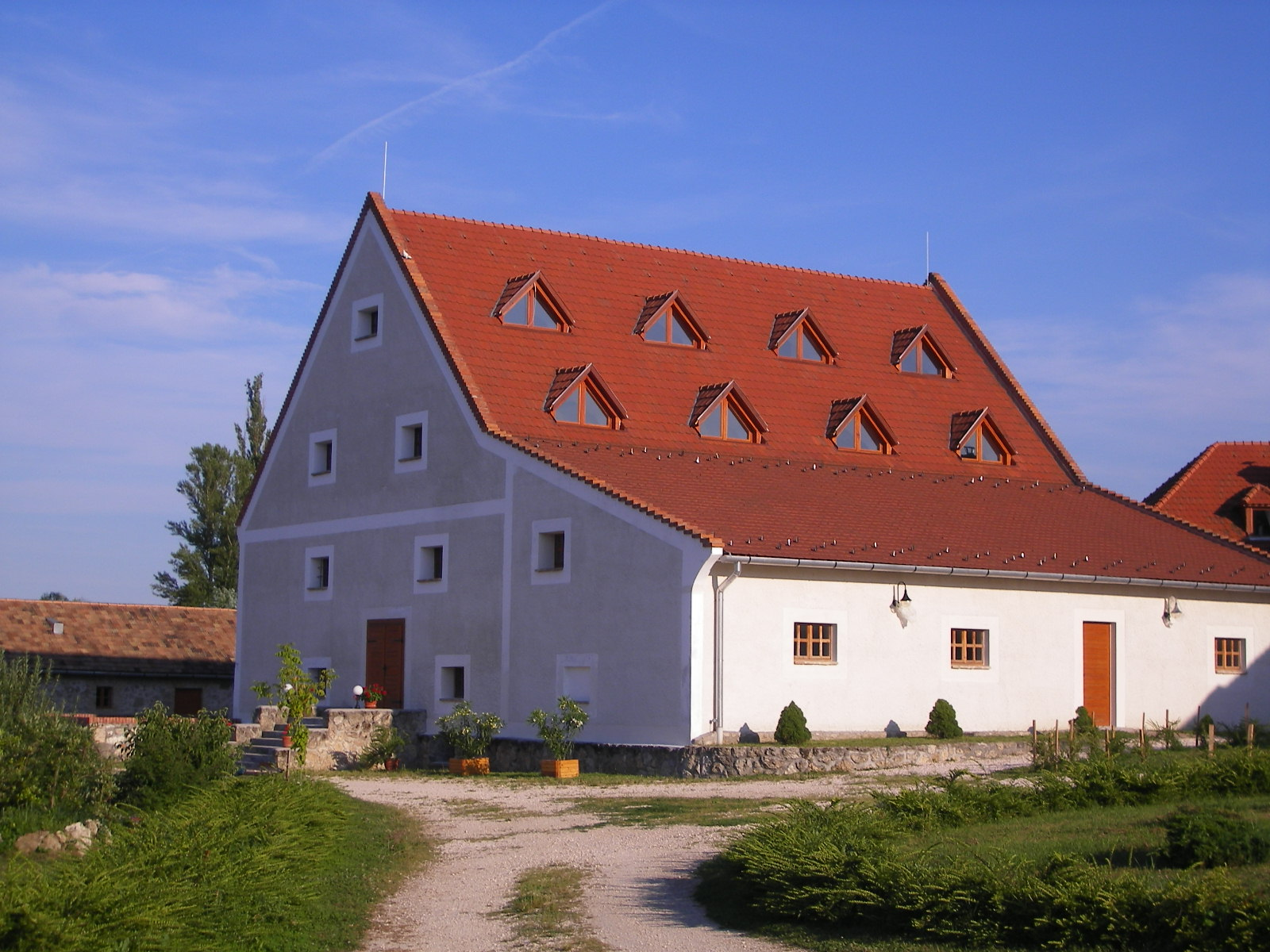 Naszály - vízimalom